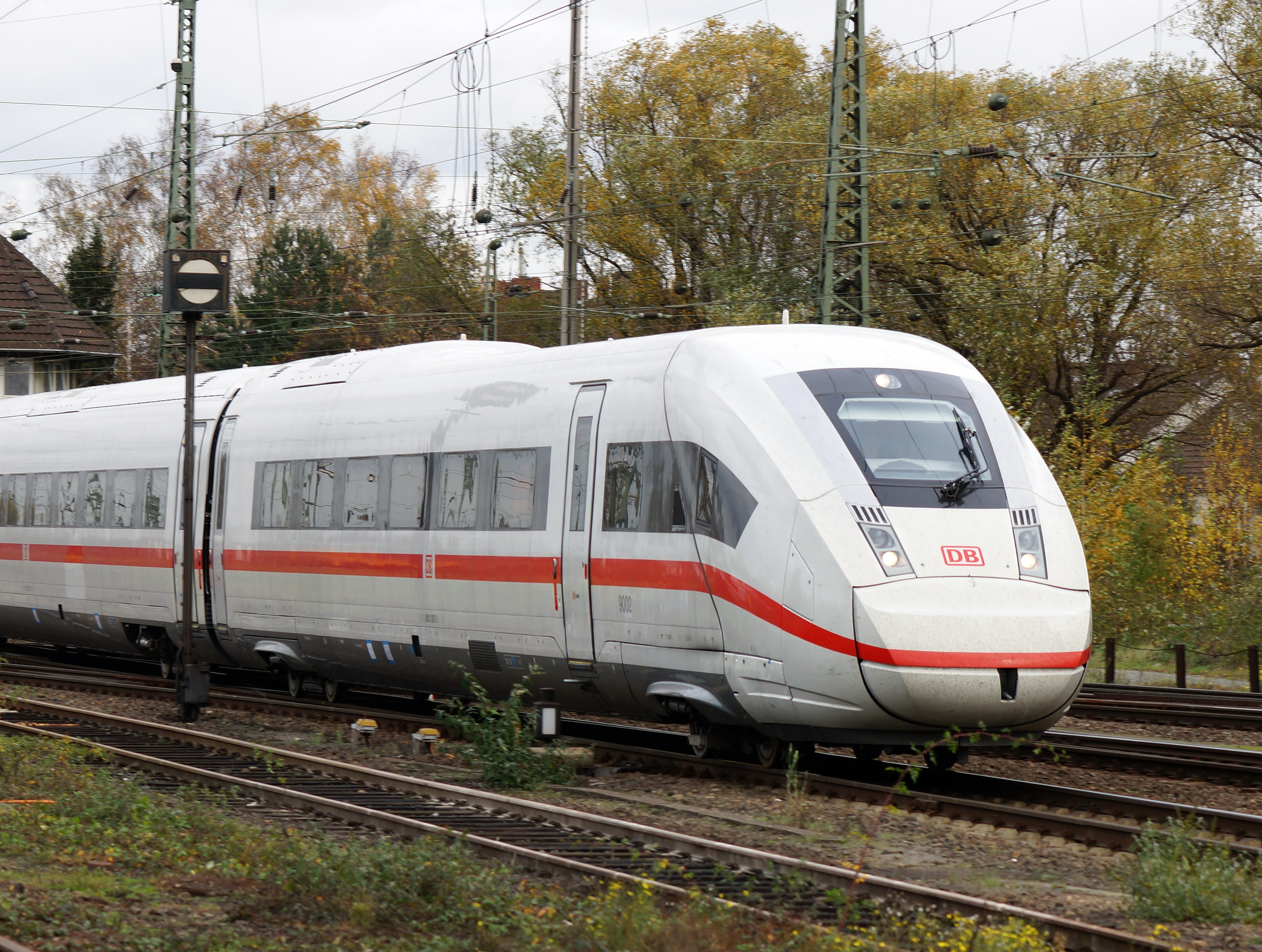 ICE 4 der DBAG (412 002) auf Probefahrt in der Nähe des Rangierbahnhofs Köln-Kalk Nord.